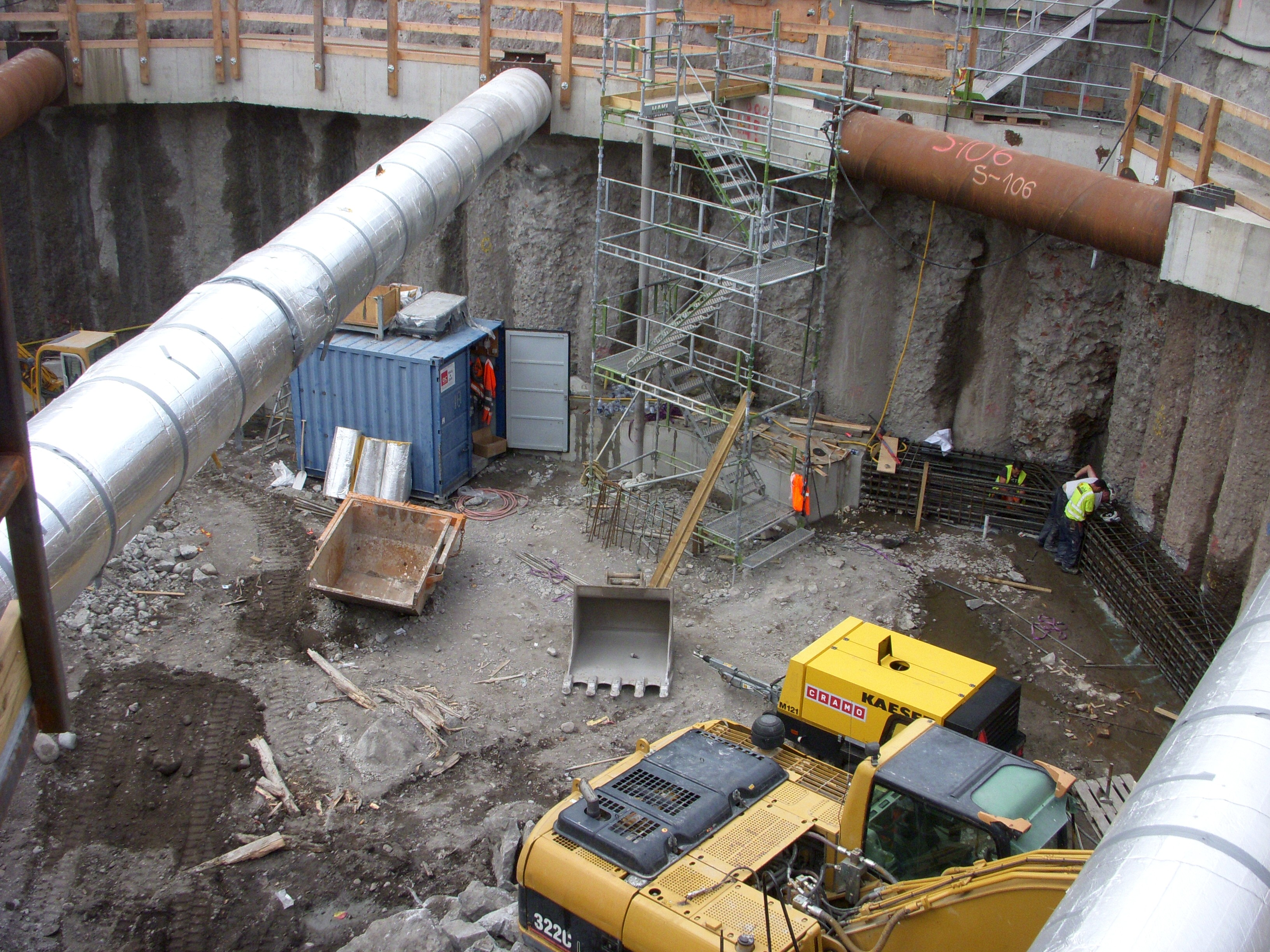 Citybanans Söderströmstunnel, mynning på västra Riddarholmen, utgrävningsplats för arkeologisk undersökning